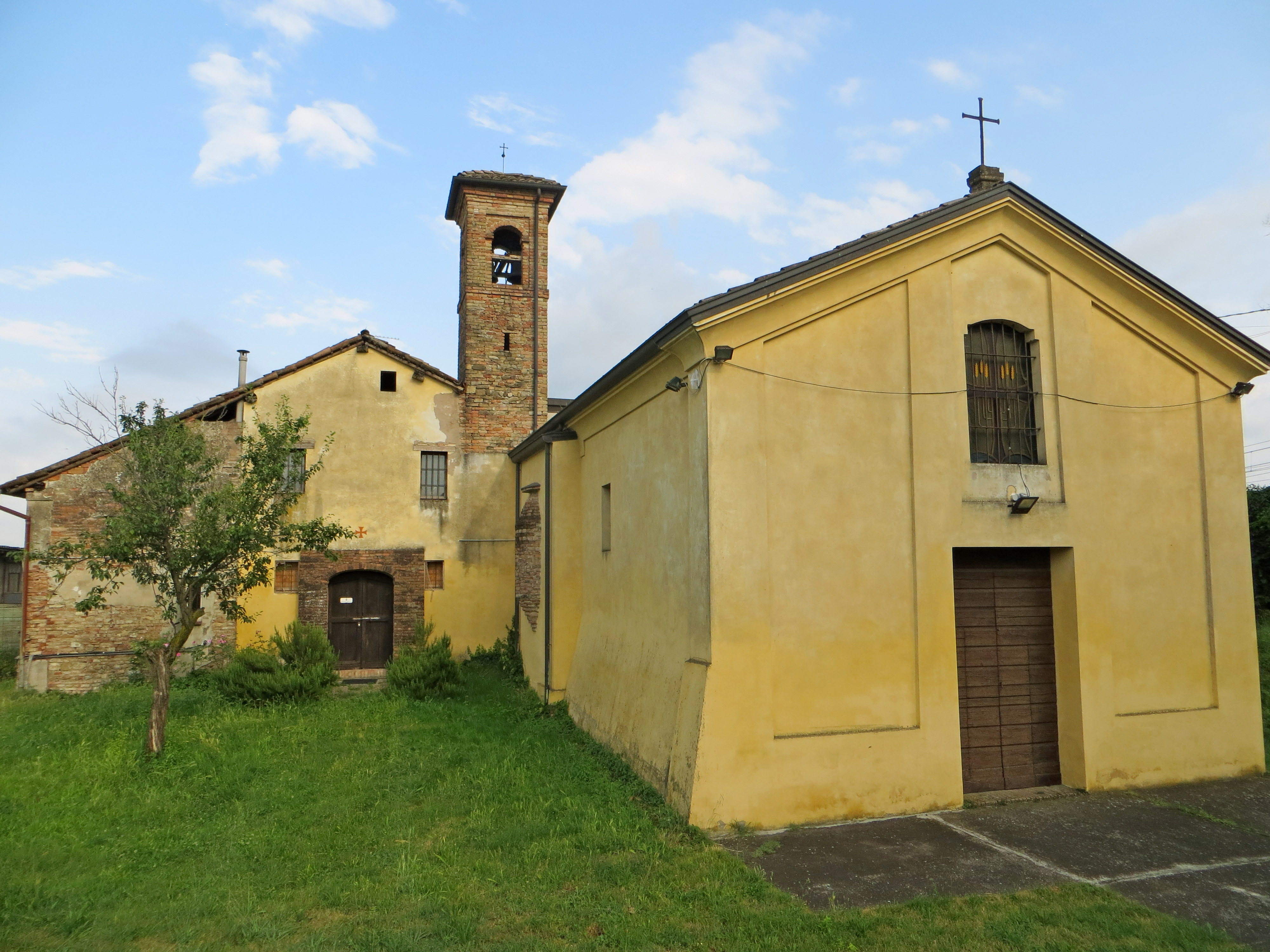 Oratorio di San Lorenzo (San Donato, Parma) - facciata e lato nord